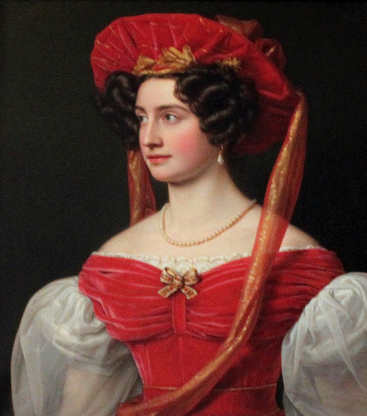 Portrait of Gräfin Isabella von Trauffkirchen-Engelberg (1808-1855)